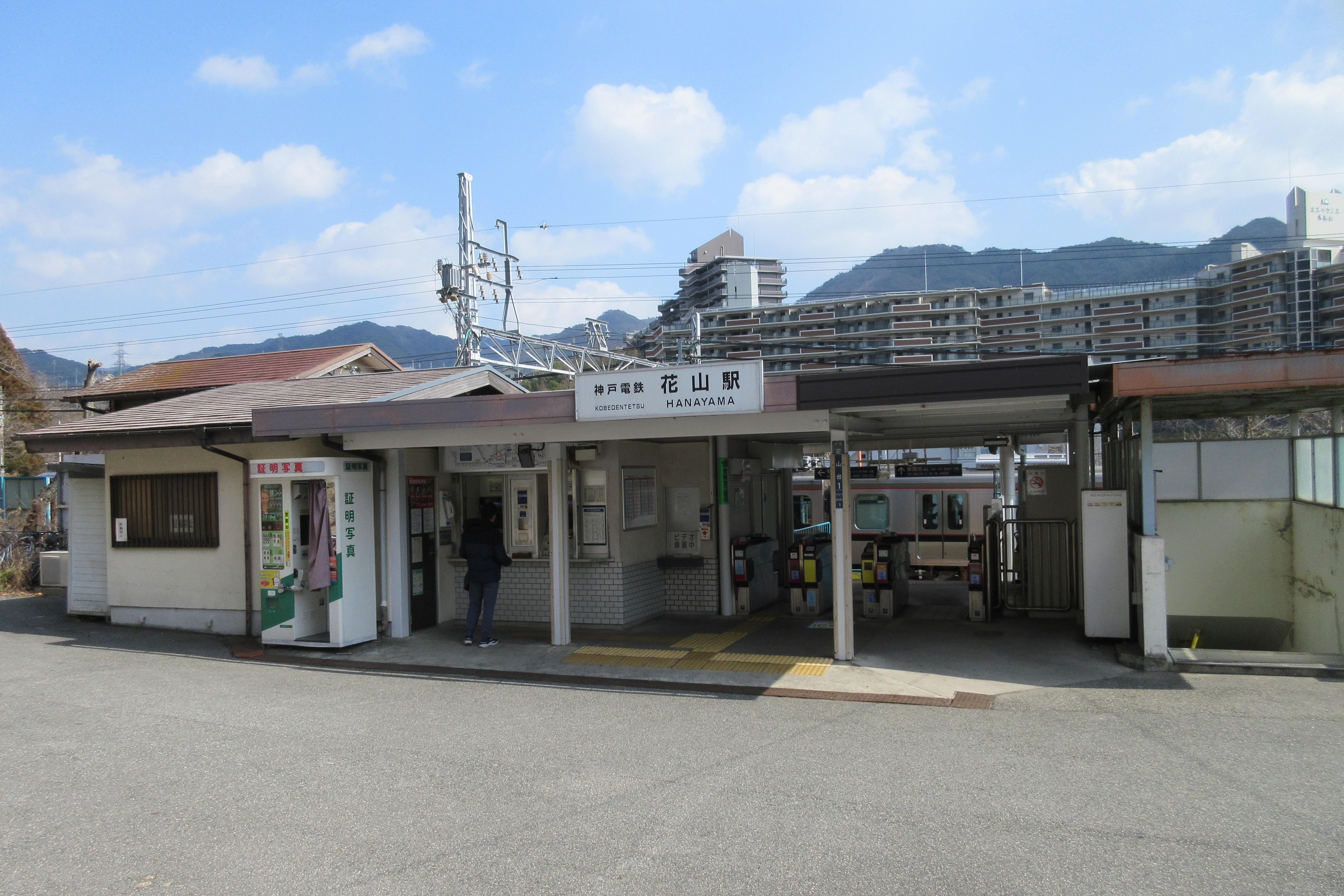 神戸電鉄花山駅